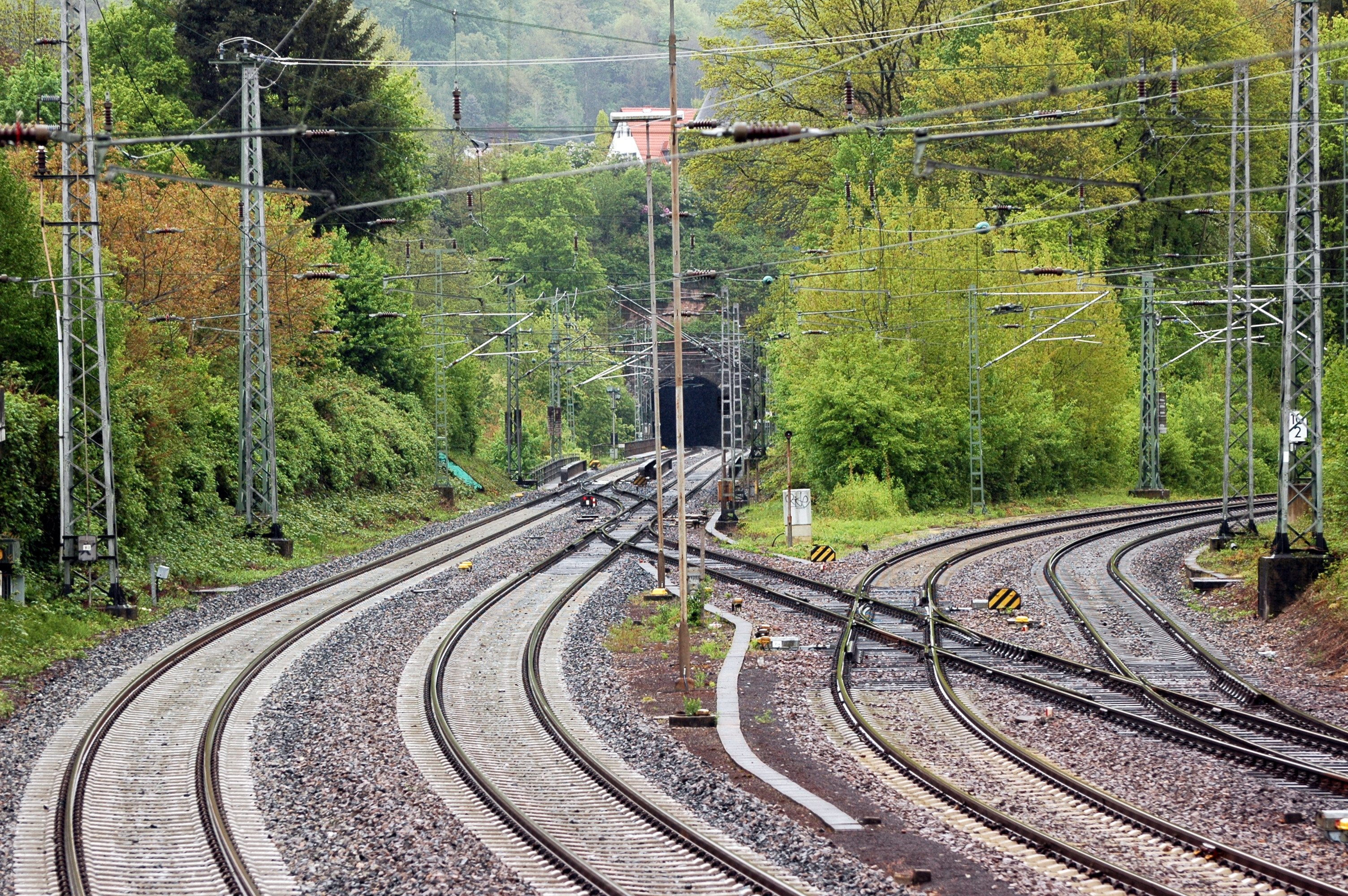 Neckargemünd - Eisenbahnstrecke S1 (links) und S5, S51 (rechst)